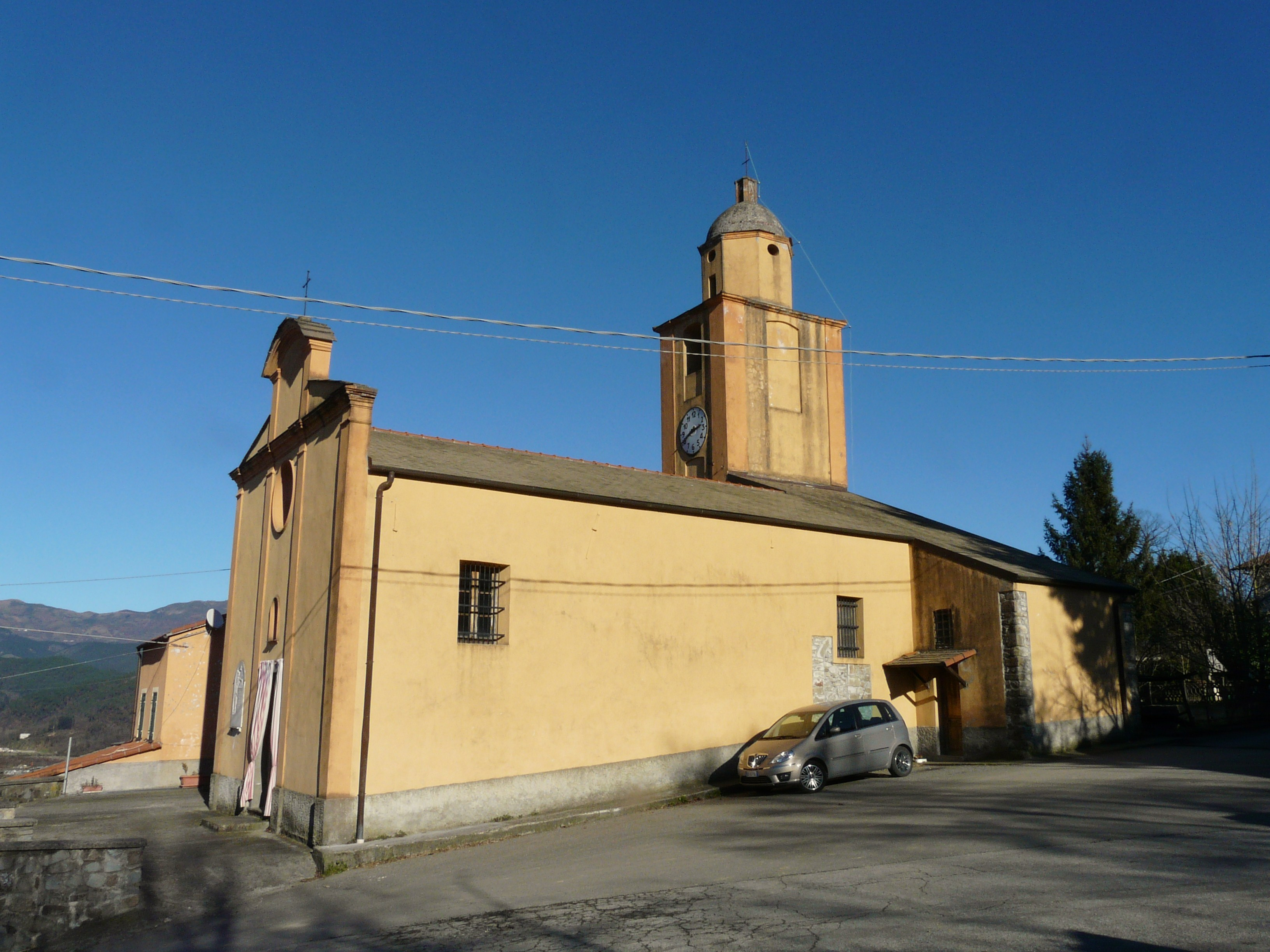 Complesso della chiesa di San Nicola di Bari, Ripalta, Borghetto di Vara, Liguria, Italia